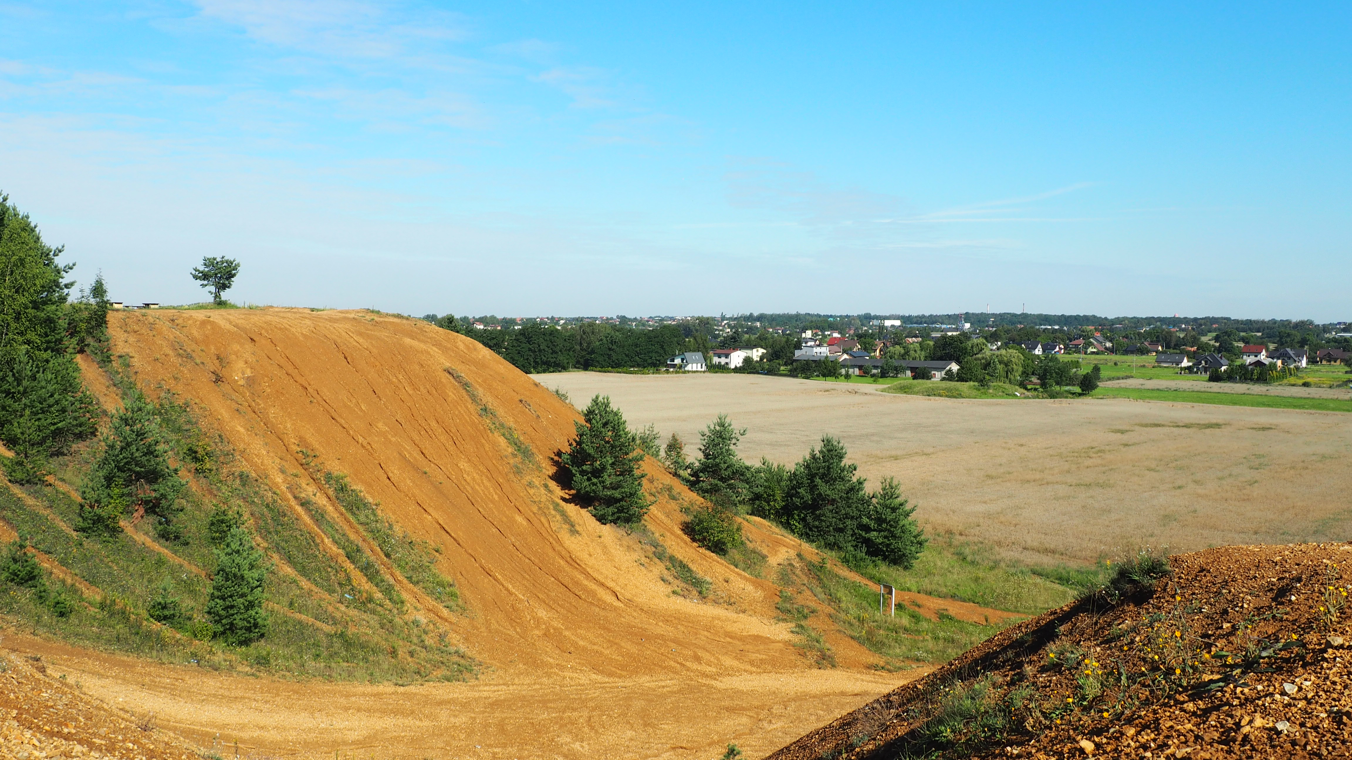 HAŁDA POPŁUCZKOWA KOPALNI FRYDERYK